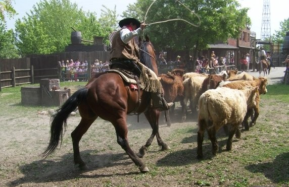 Cowboyland, parco divertimenti di Voghera, Lombardia, Italia.